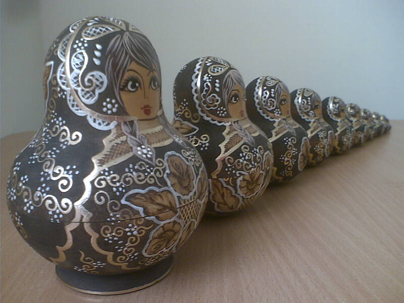 == شرح ==